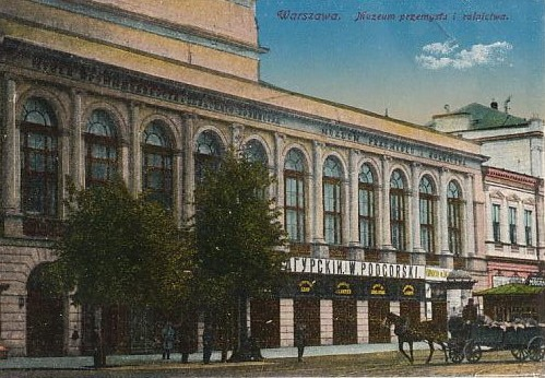 Warszawa, Poland, Muzeum Przemysłu i Rolnictwa, before 1914